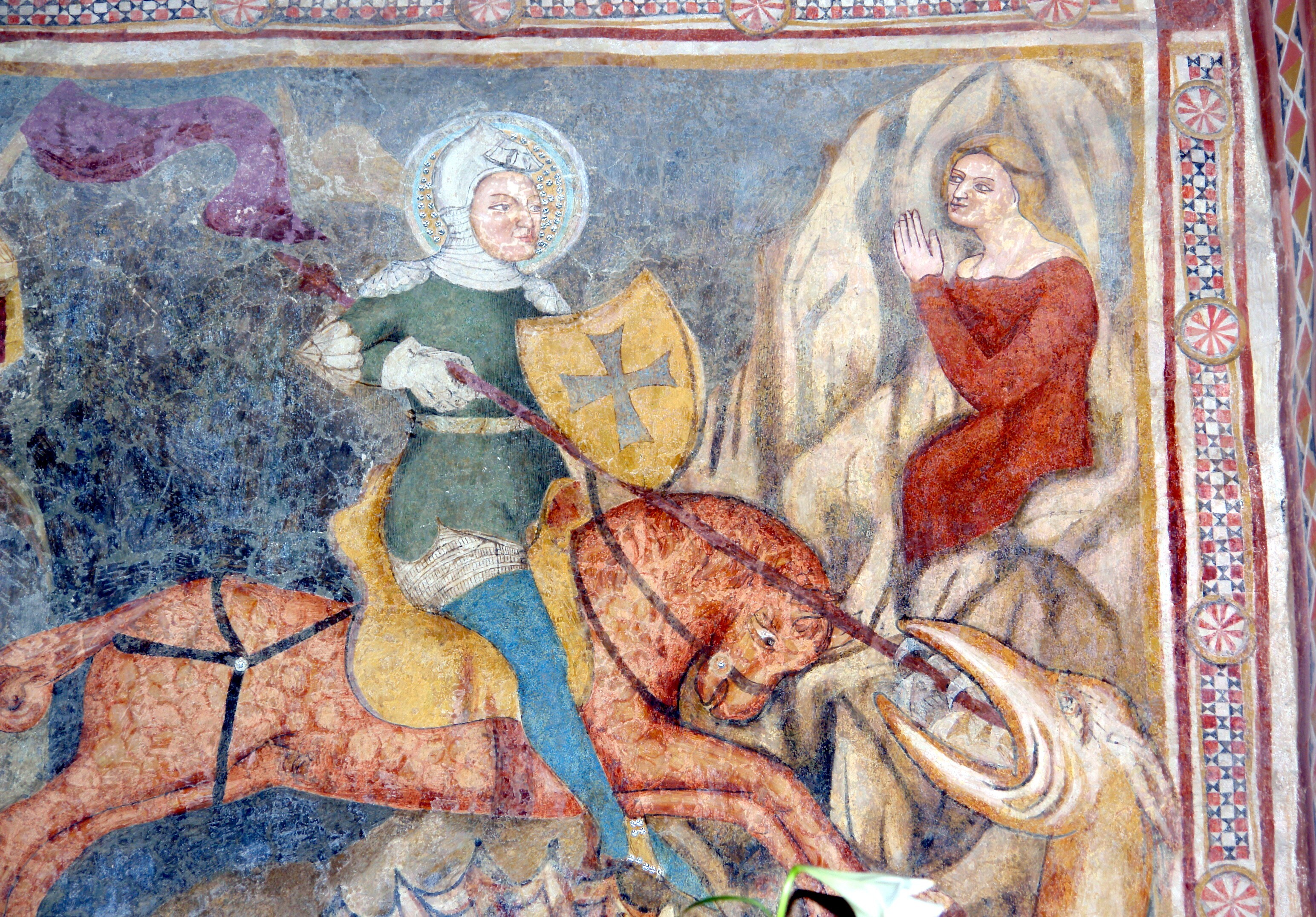 Cserény: Szent Márton tiszteletére szentelt római katolikus temploma 14. századi gótikus stílusú, korabeli freskókkal.